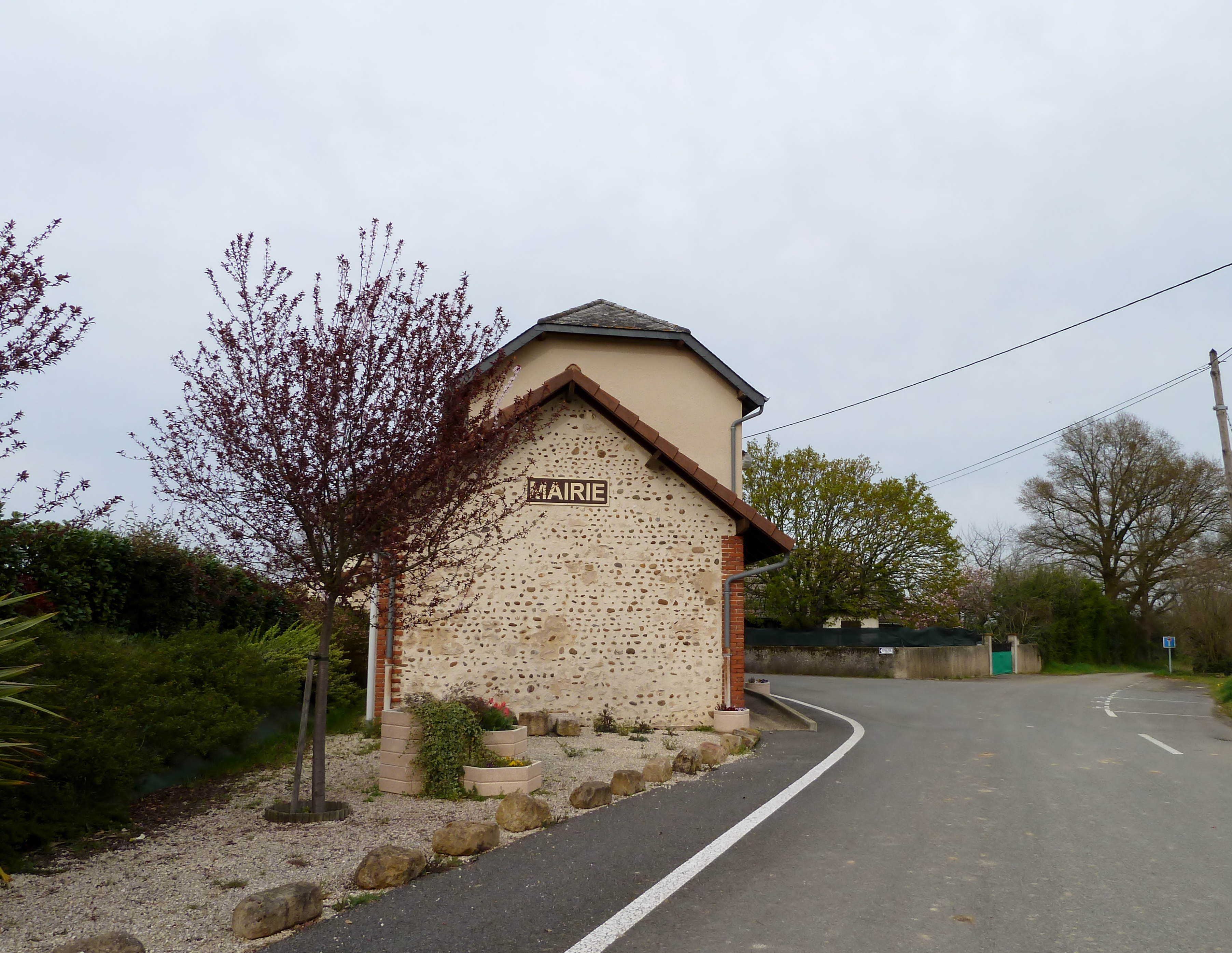 Mairie de Ribarrouy